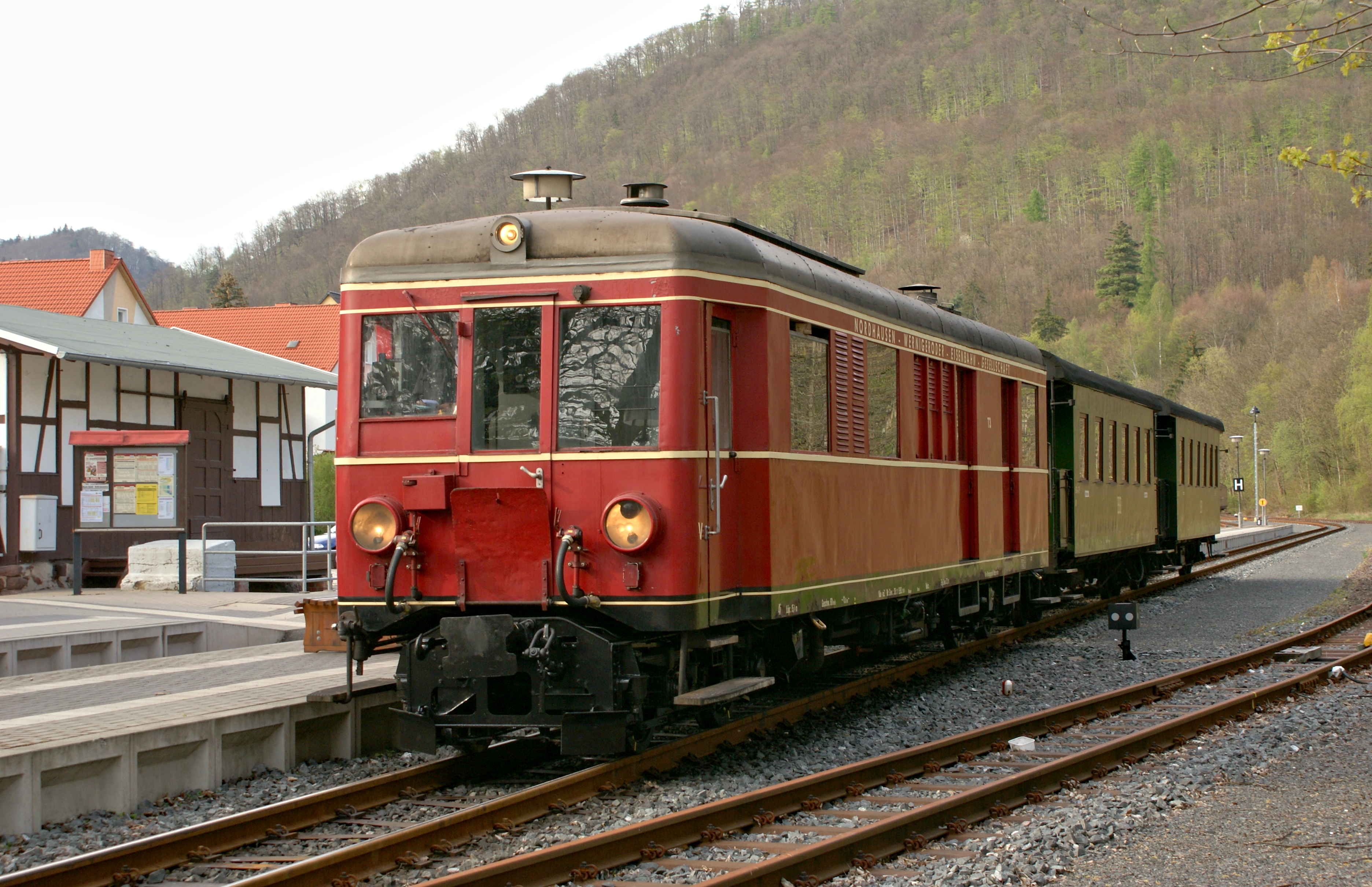 Triebwagen NWE T3 (187 025), MAN 1938, Bo’Bo’de, mit Überführungszug in Ilfeld 27.April 2012